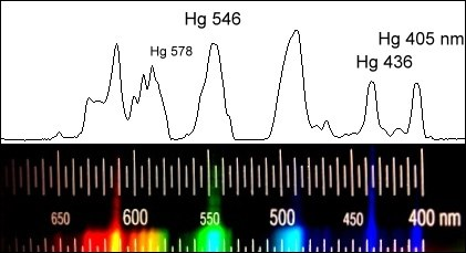 Beschreibung: Lichtspektrum einer Leuchtstoff-Lampe, aufgenommen mit einem Taschenspektrometer der Fa. FRT (Bergisch Gladbach)